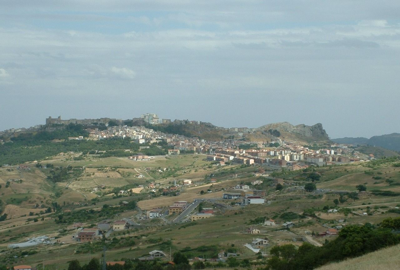 Panorama di Troina (EN)